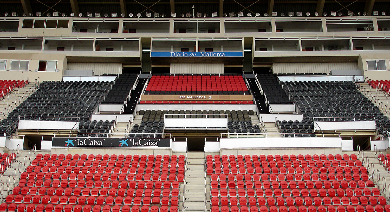 Son Moix aka ONO Estadi (RCD Mallorca)